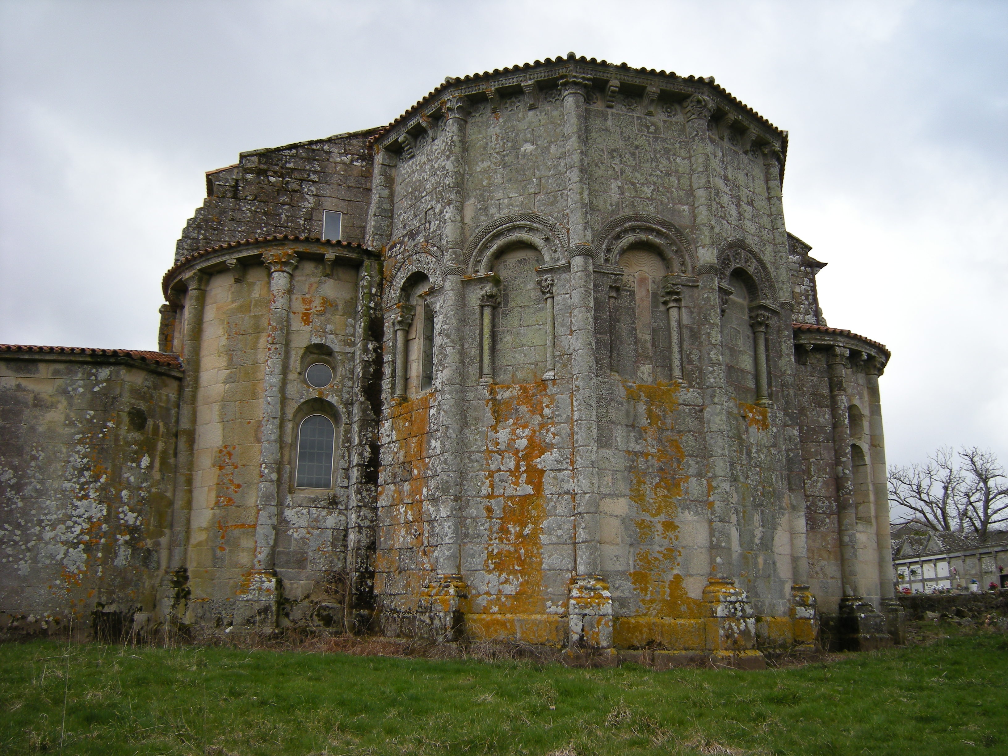 Esta foto participó en el juego En un lugar de Flickr.